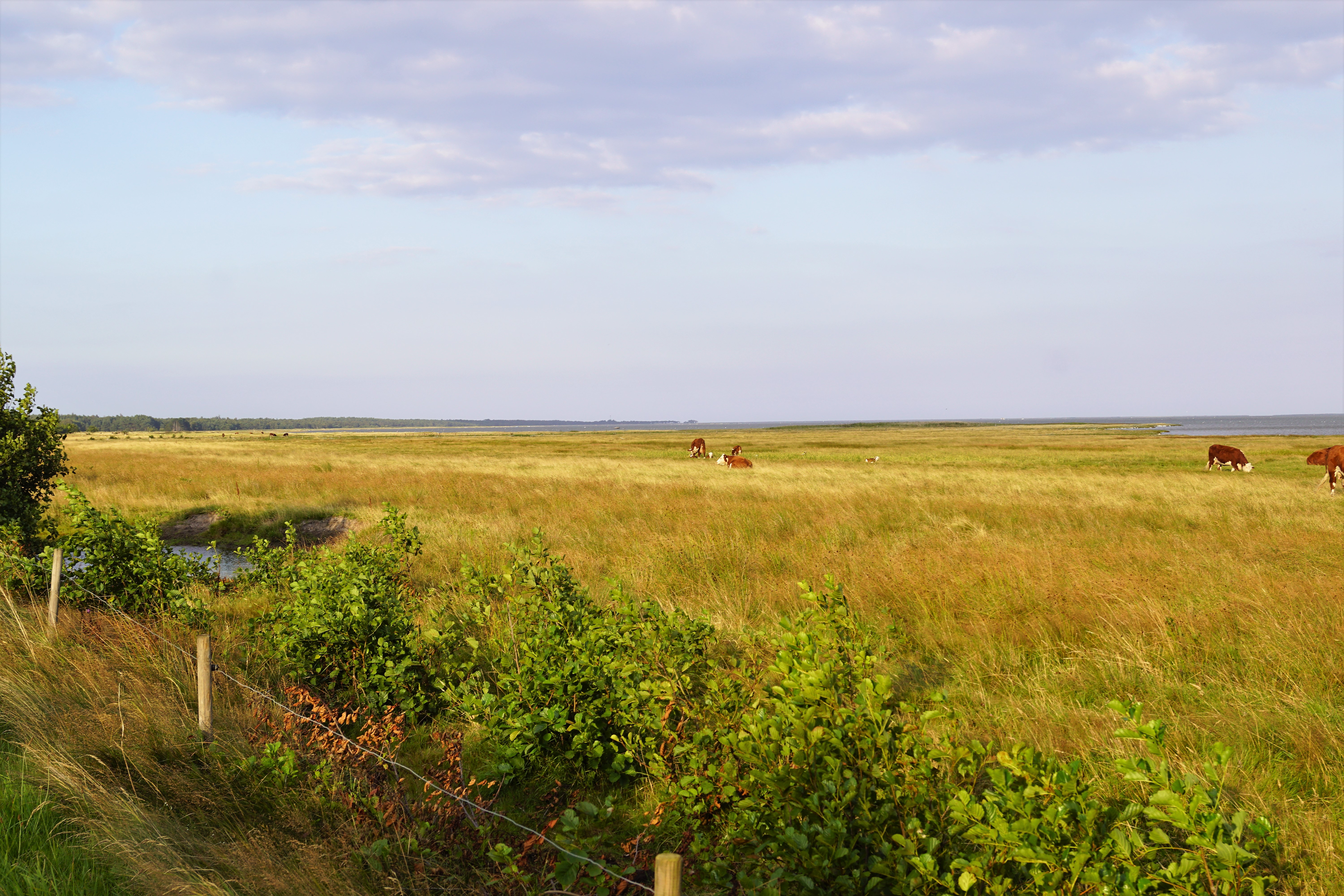 Bovet og Bovet Bugt set mod øst